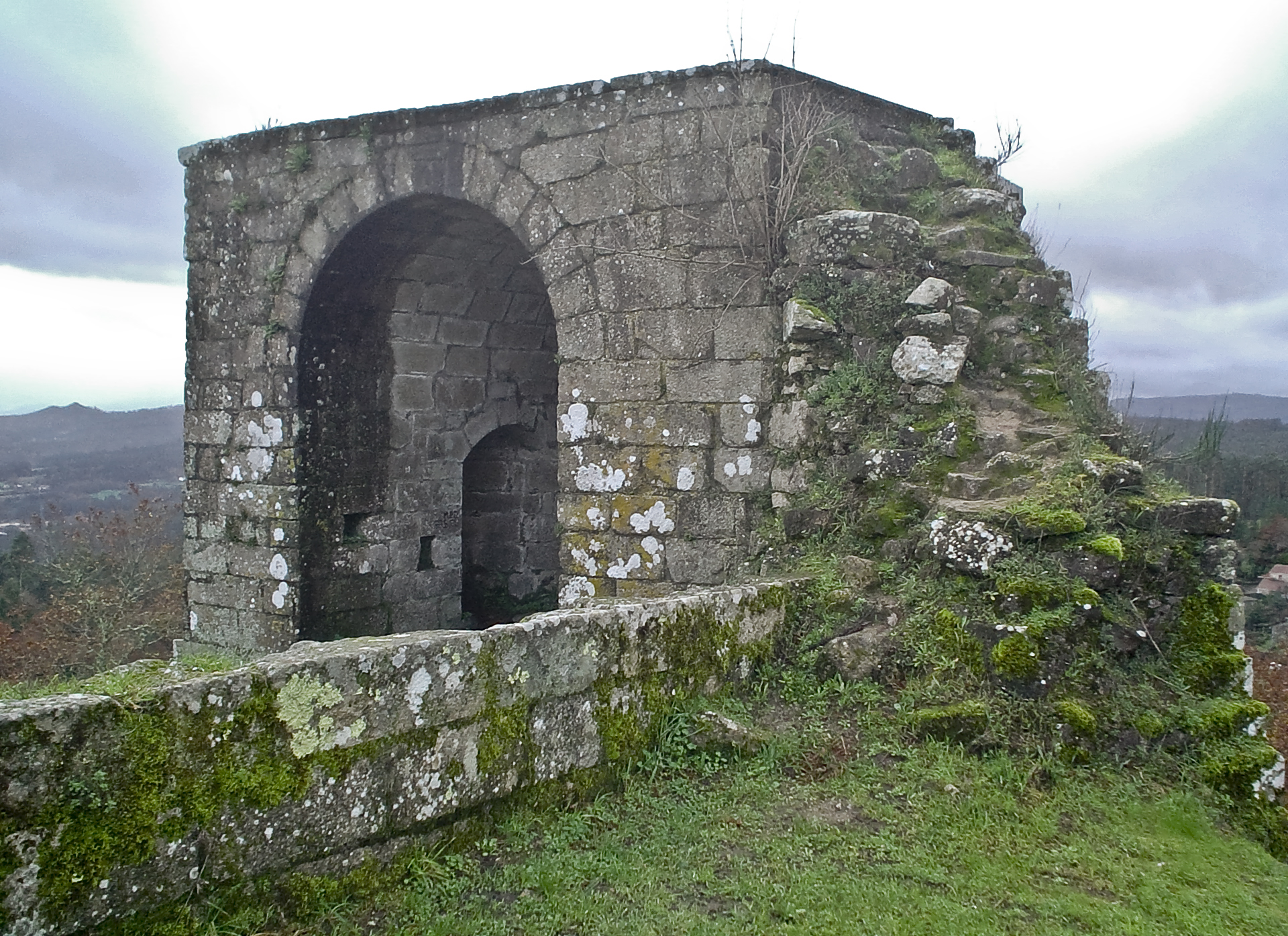 Torres de Altamira. Parede do Palacio